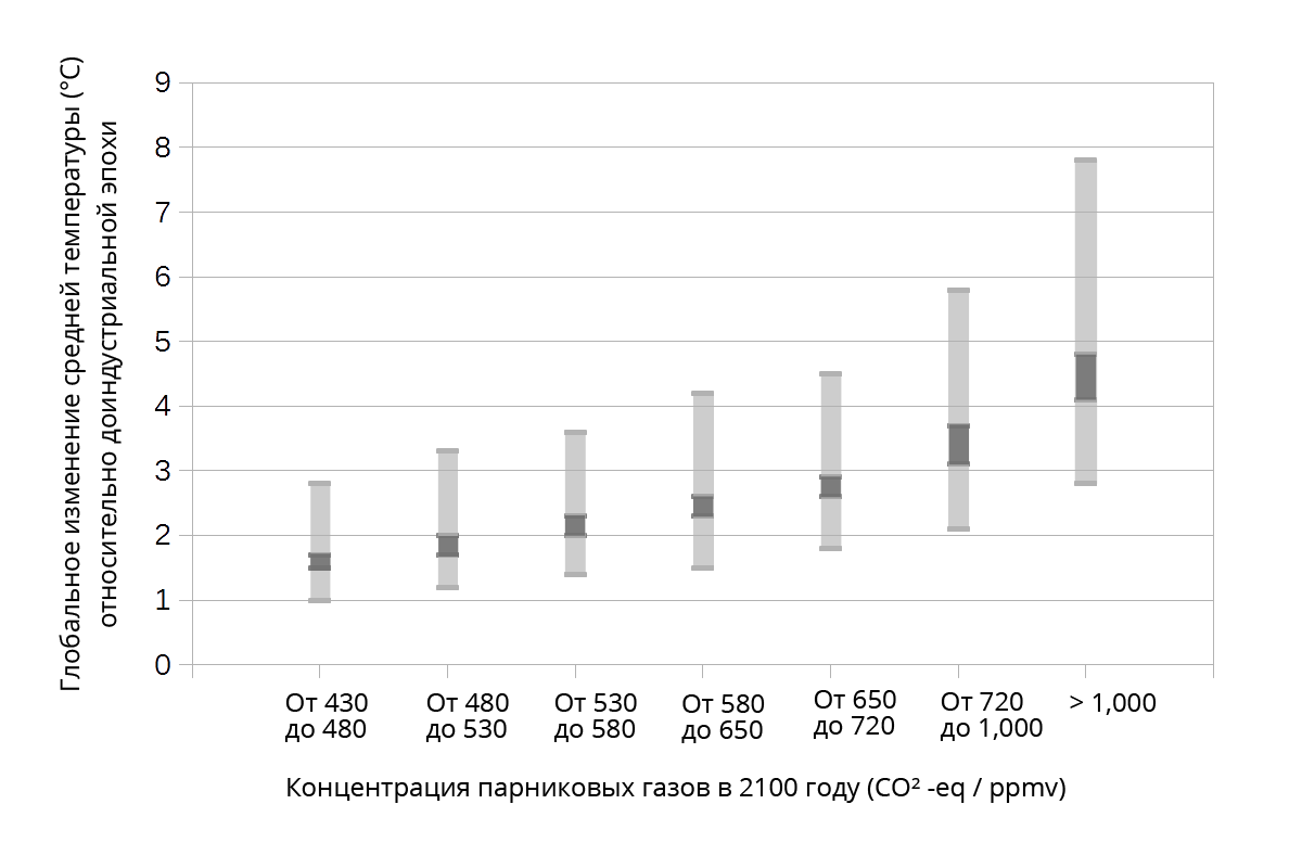 Увеличение глобальной средней температуры при разной концентрации парниковых газов в атмосфере.